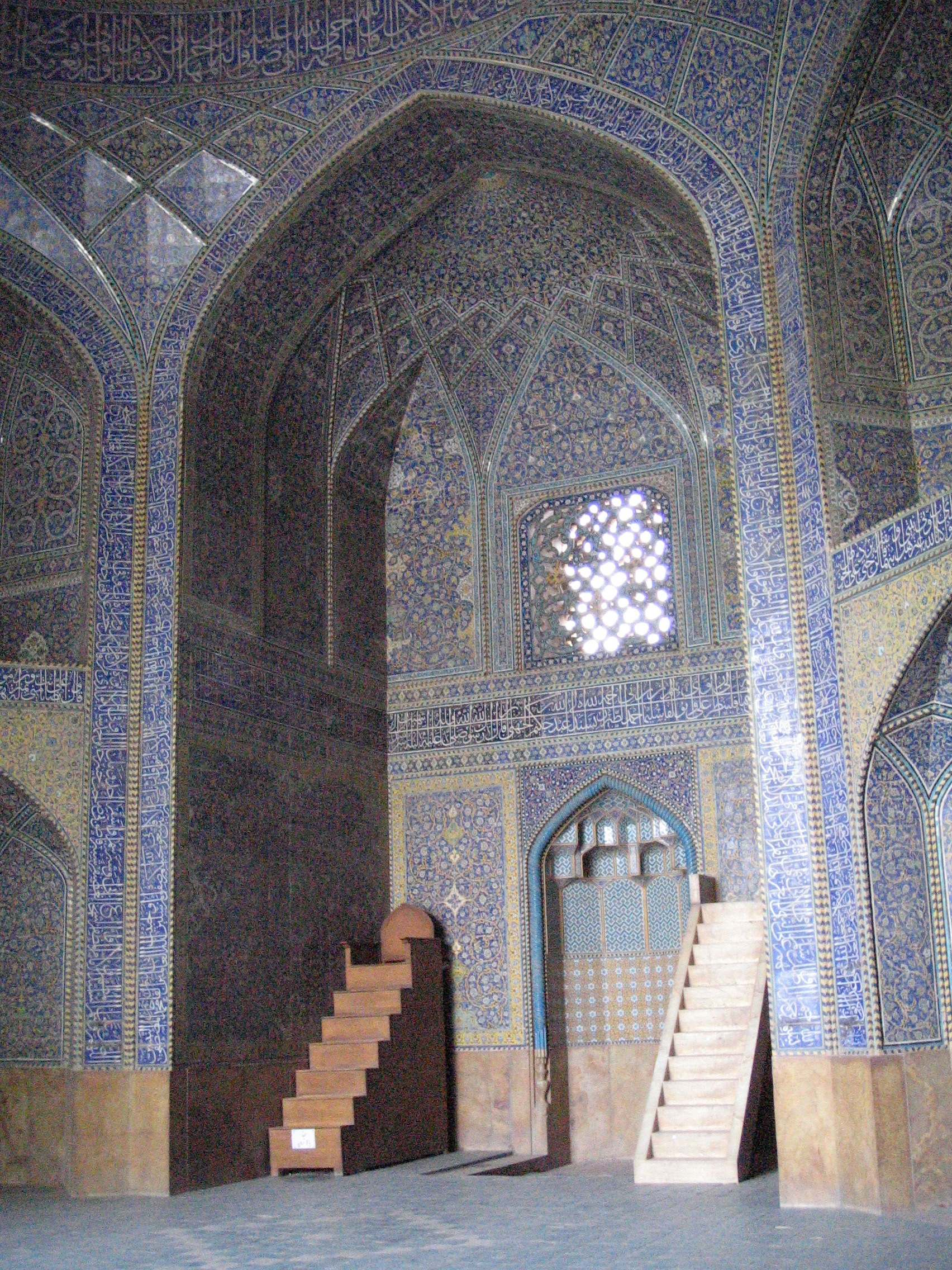 inside madreseh-e-chahr bagh in Esfahan.